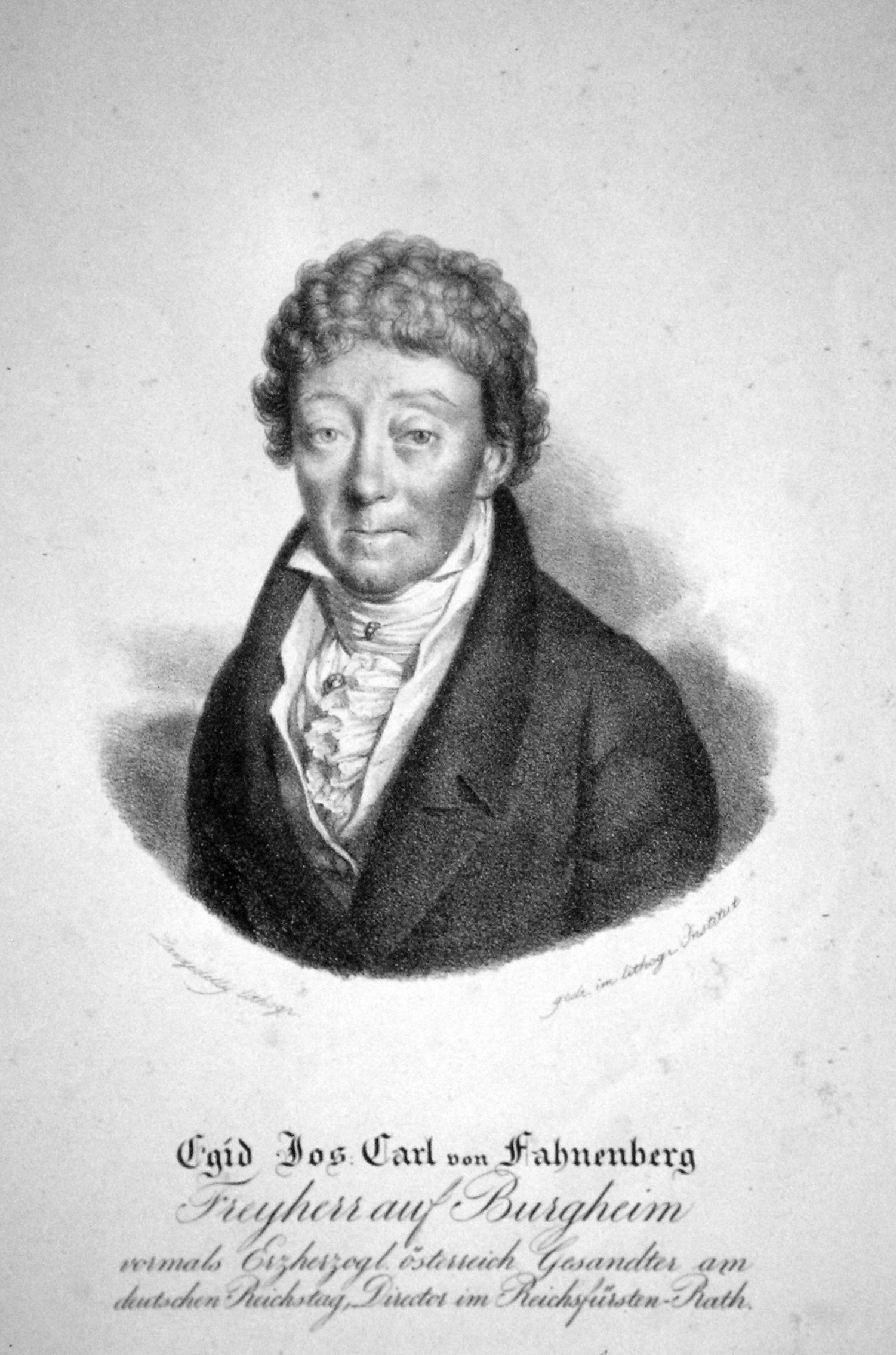 Egid Josef Karl Freiherr von Fahnenberg (1749-1827), Diplomat Lithographie von Josef Lanzedelli d. Ä., ca.1820